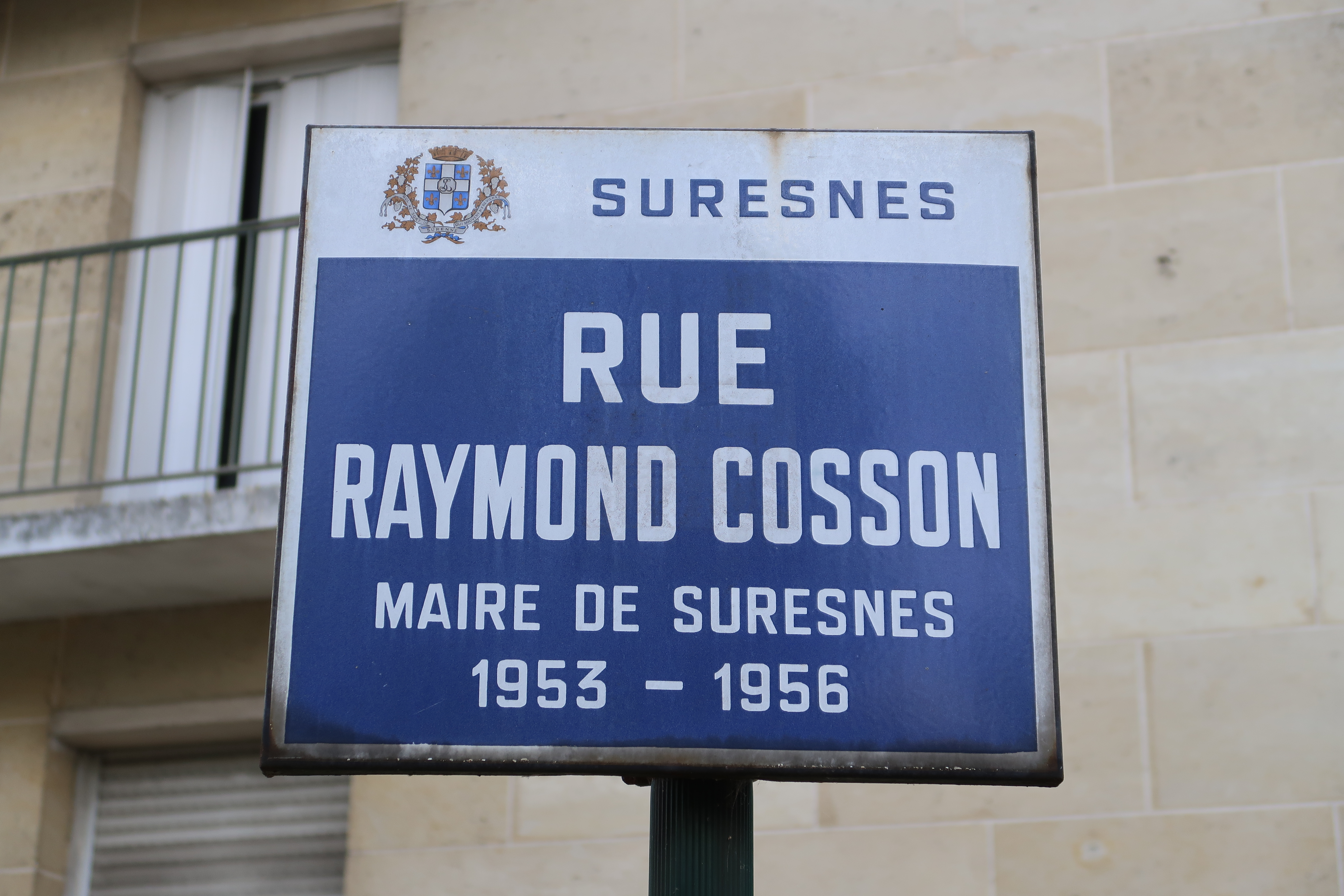 Plaque de la rue Raymond-Cosson à Suresnes (Hauts-de-Seine).